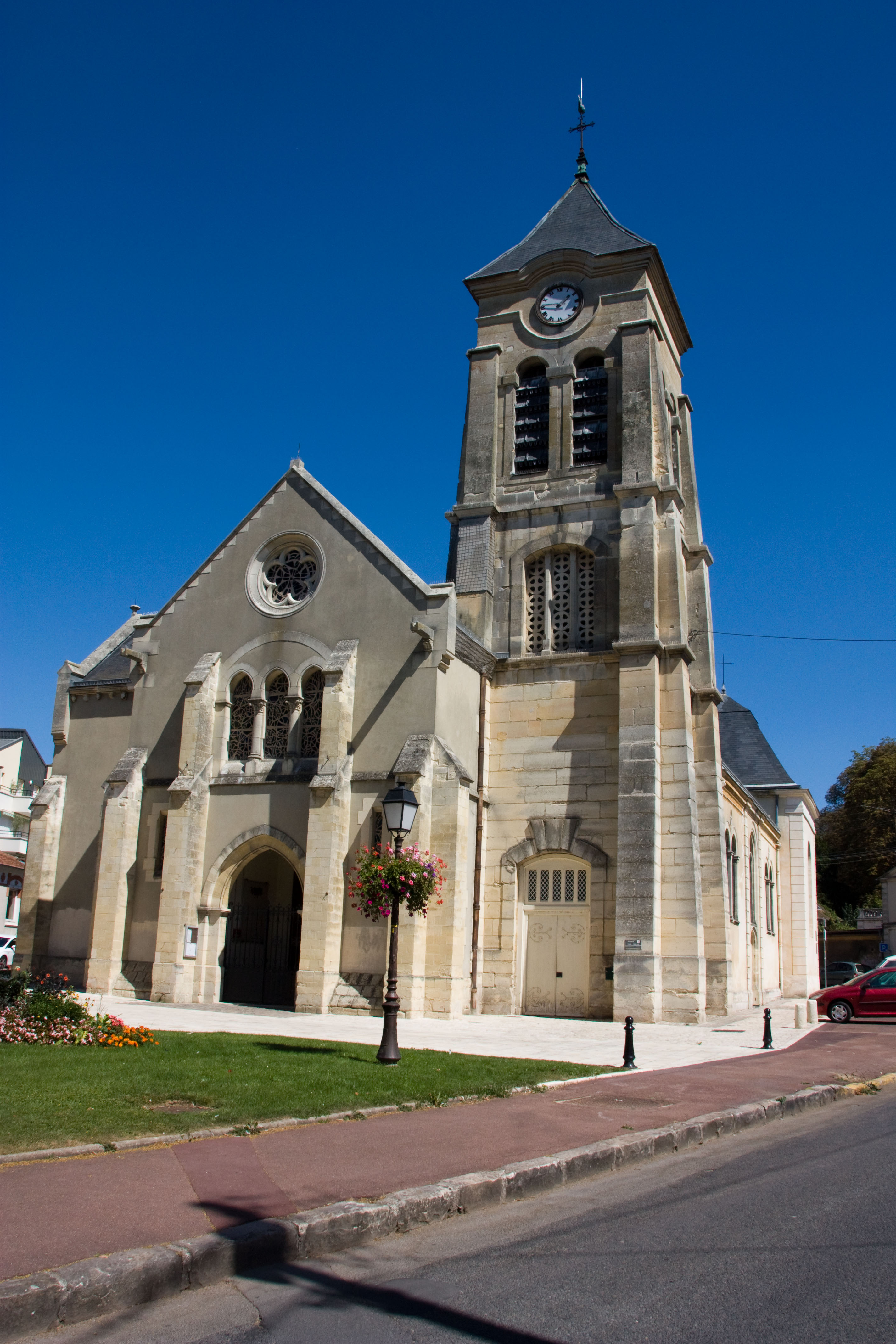 Eglise de Soisy-sur-Seine, Soisy-sur-Seine, Essonne, France